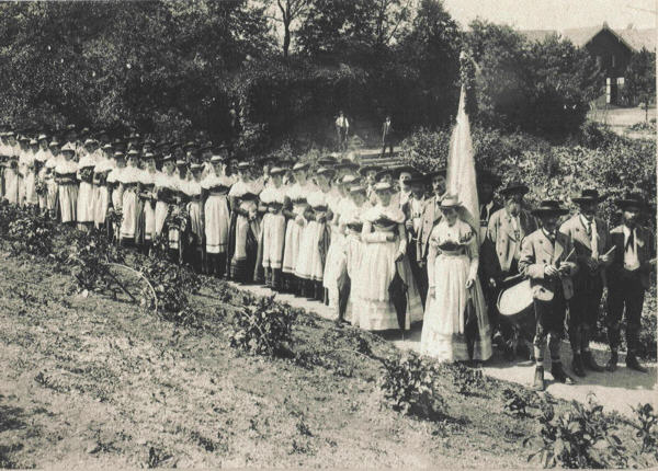 Trachtenverein Miesbach im Jahr 1862